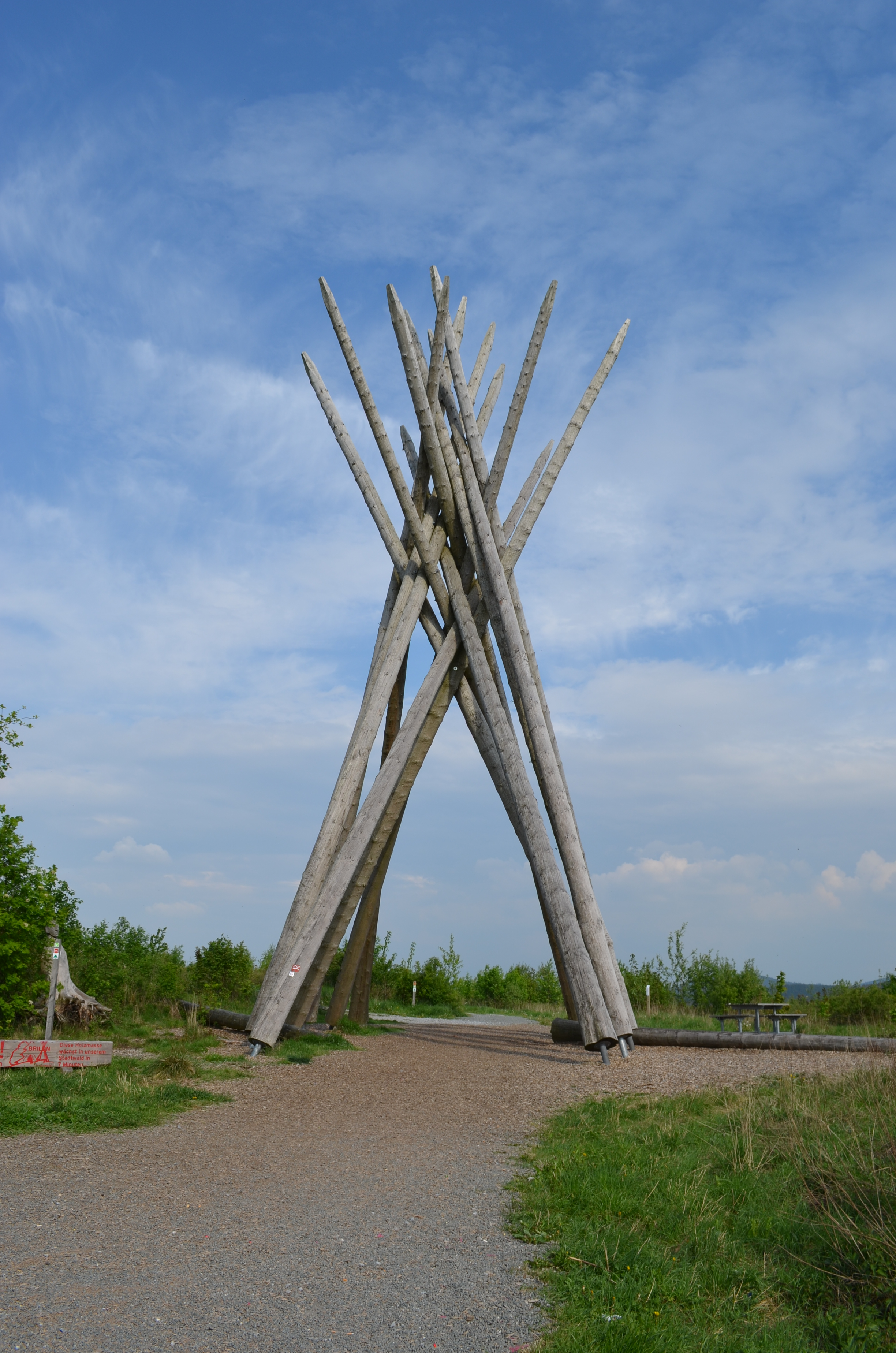 Petersborn\Gudenhagen- Petersborn Kyrilltor